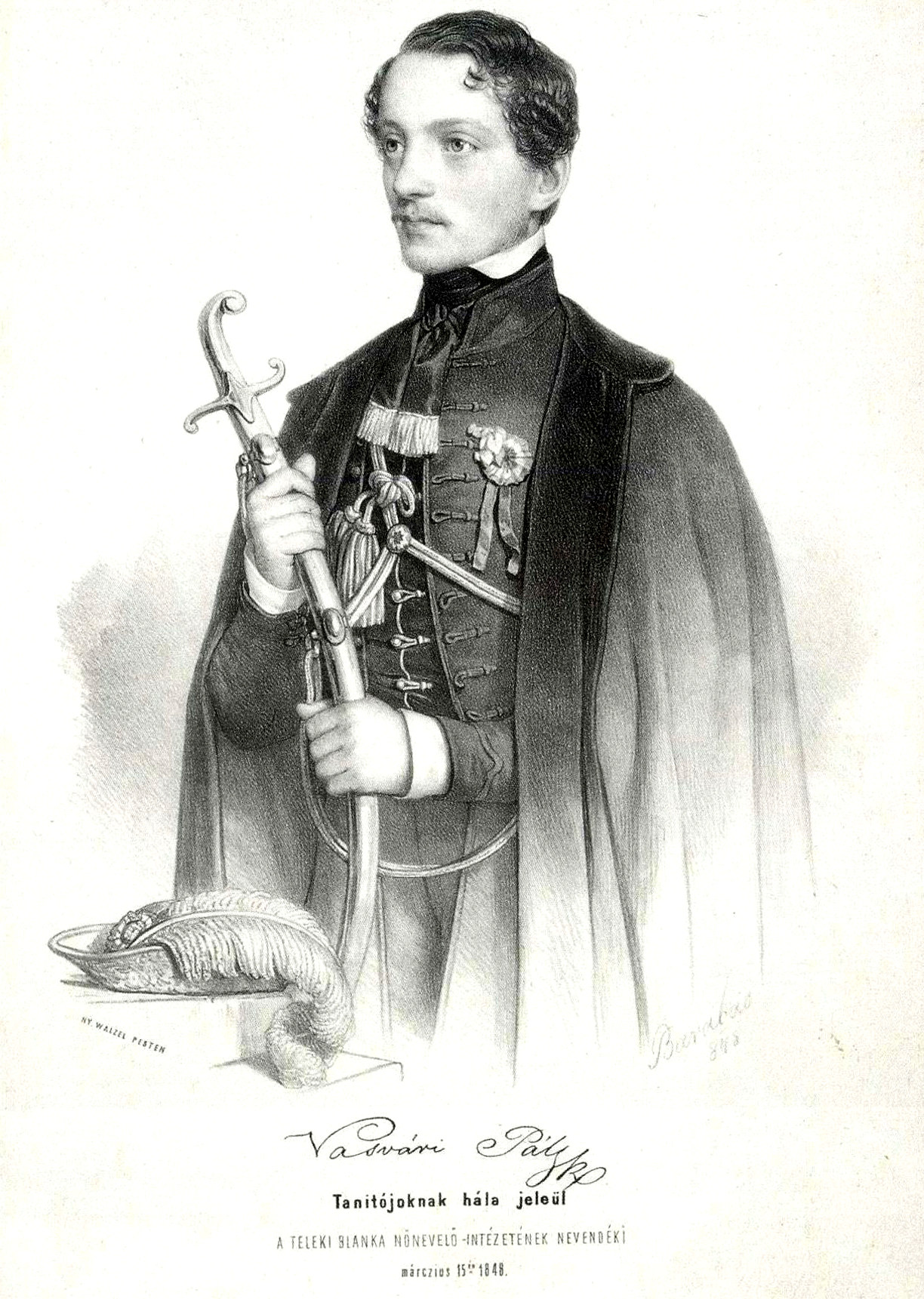 Vasvári Pál (eredeti nevén Fejér Pál; Bűd, 1826. július 14. – Havasnagyfalu, 1849. július 5.) történész, filozófus, politikus, forradalmár, a „márciusi ifjak” egyik vezéralakja, honvéd őrnagy.